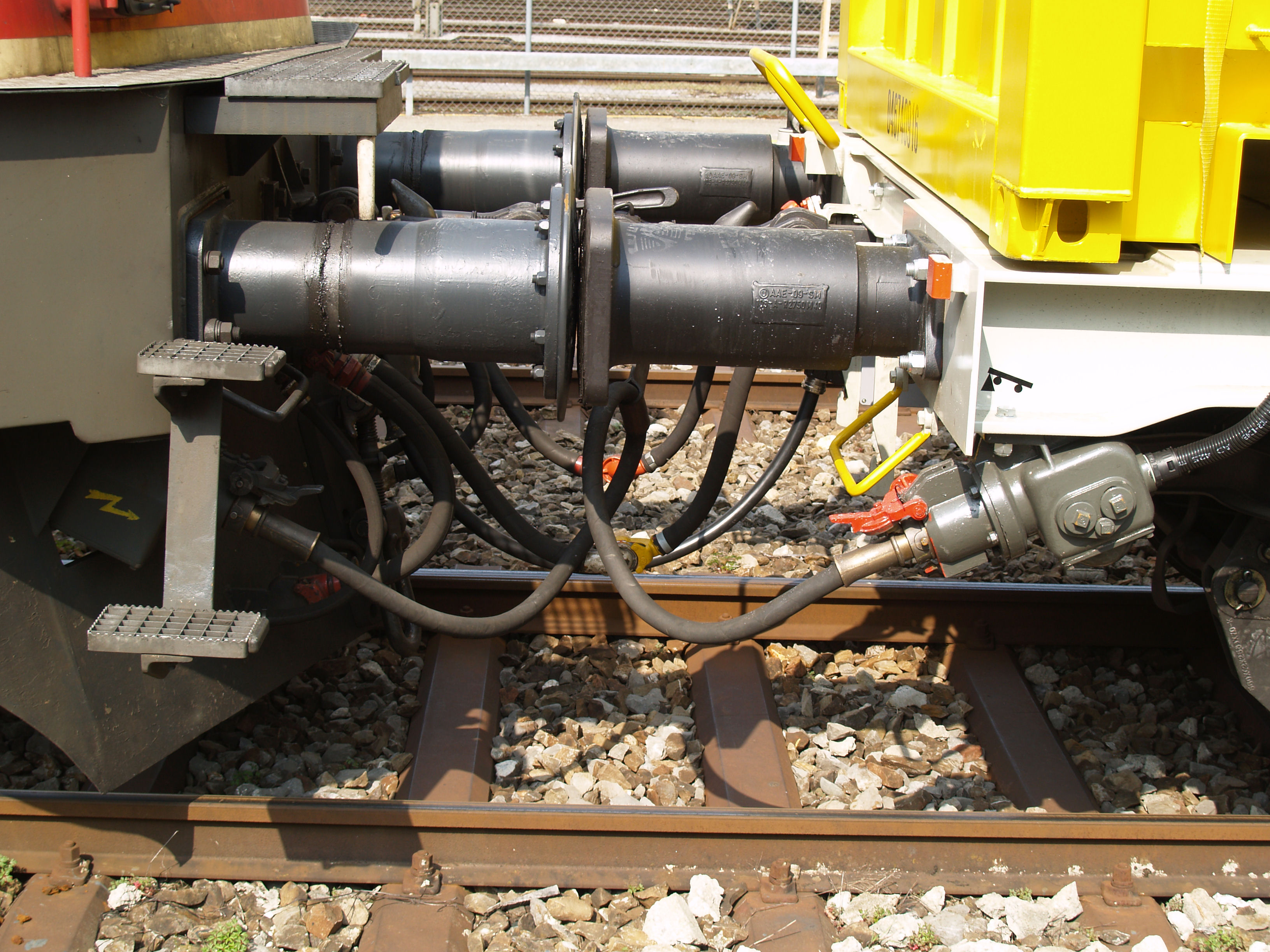 Die Verbindung zwischen Lokomotive und Koppelwagen des Cargo-Pendelzuges.